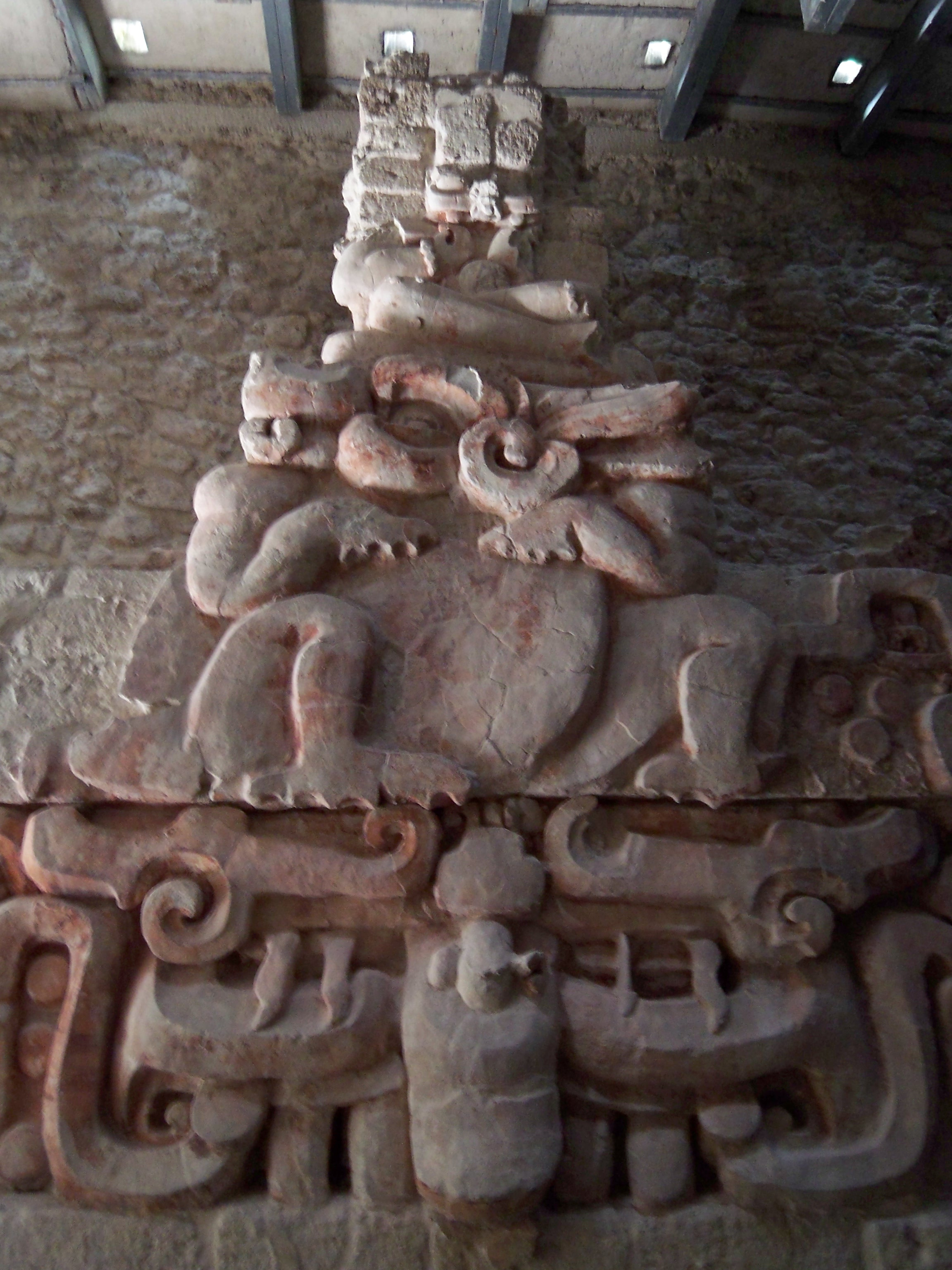 Fries von BalamkÃº